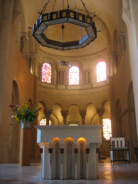 Tournus, Saône-et-Loire, Bourgogne, France. Abbatiale Saint-Philibert. Choeur.